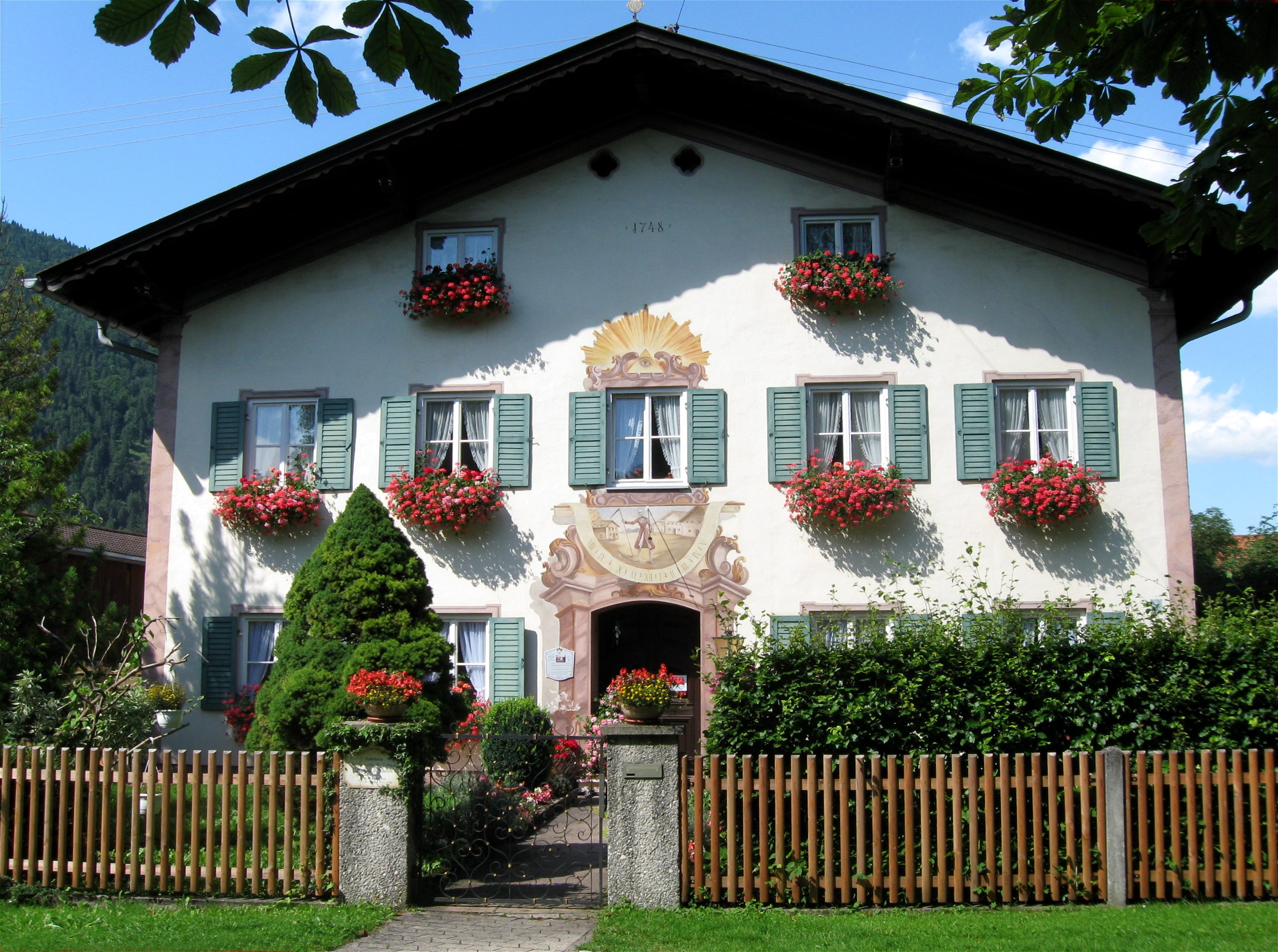 Am Gern 4, Farchant, Ehem. Benefiziatenhaus, jetzt Pfarrhaus; stattlicher Putzbau mit Flachsatteldach und Lüftlmalerei, bez. 1748